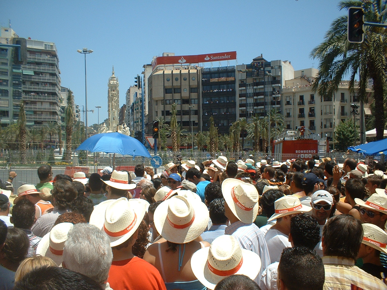 Mascleta Luceros